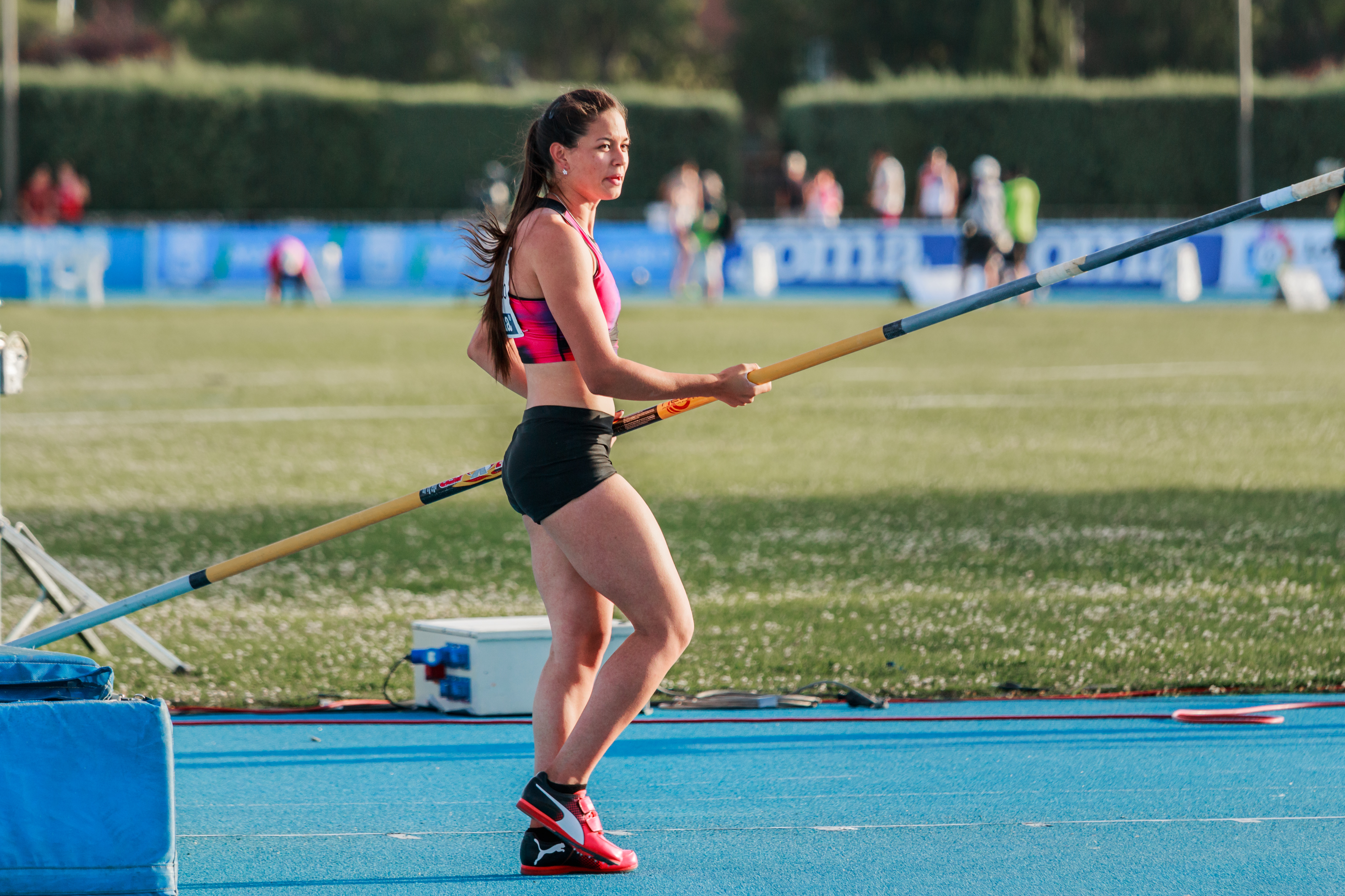 Robeilys Peinado (VEN). Salto con garrocha. IAAF World Challenge. Meeting Madrid 2017. Moratalaz, Madrid.